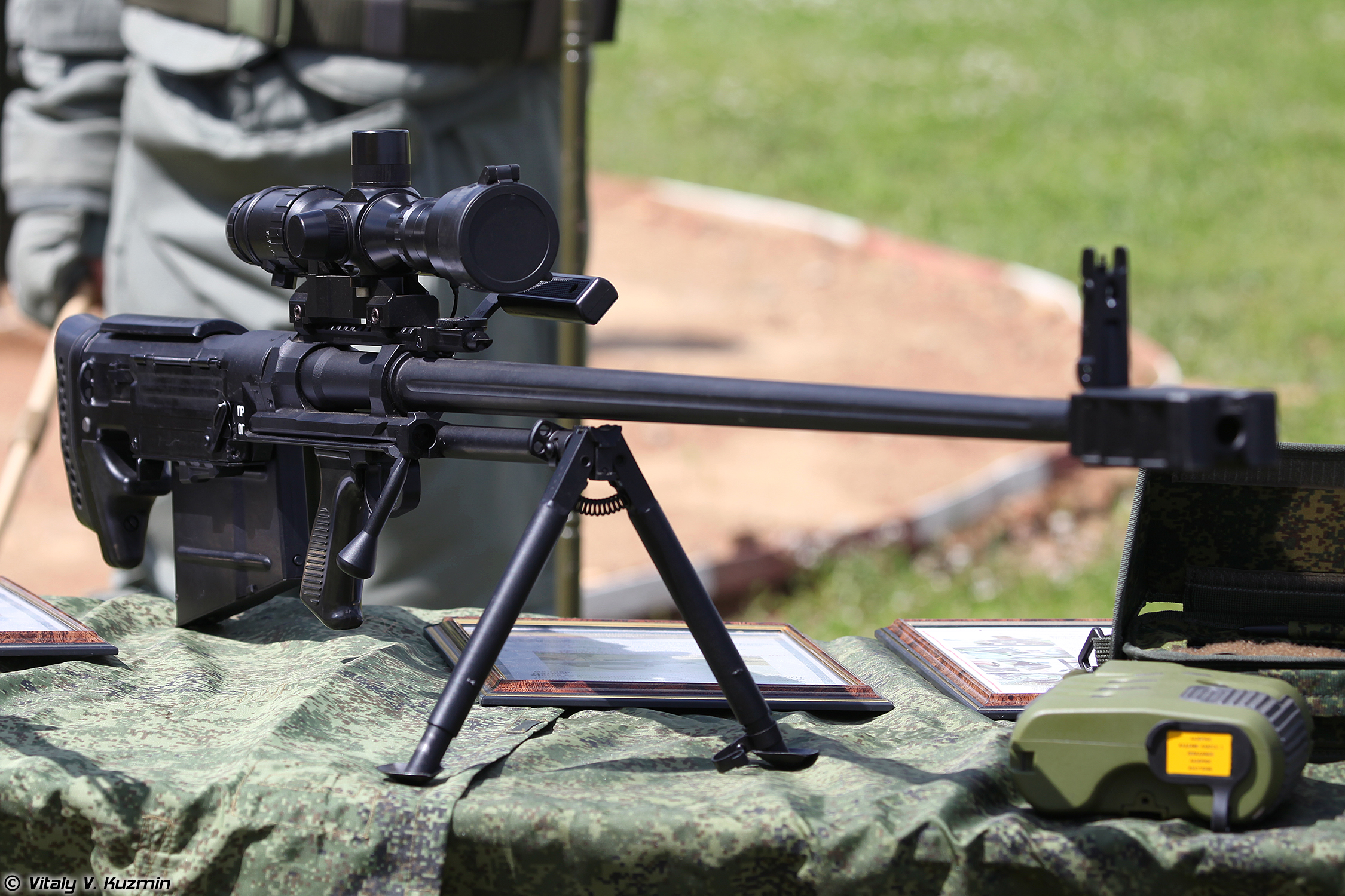 Модернизированная крупнокалиберная снайперская винтовка АСВК Корд-М 6В7М (12.7mm modernized sniper rifle ASVK Kord-M 6V7M)